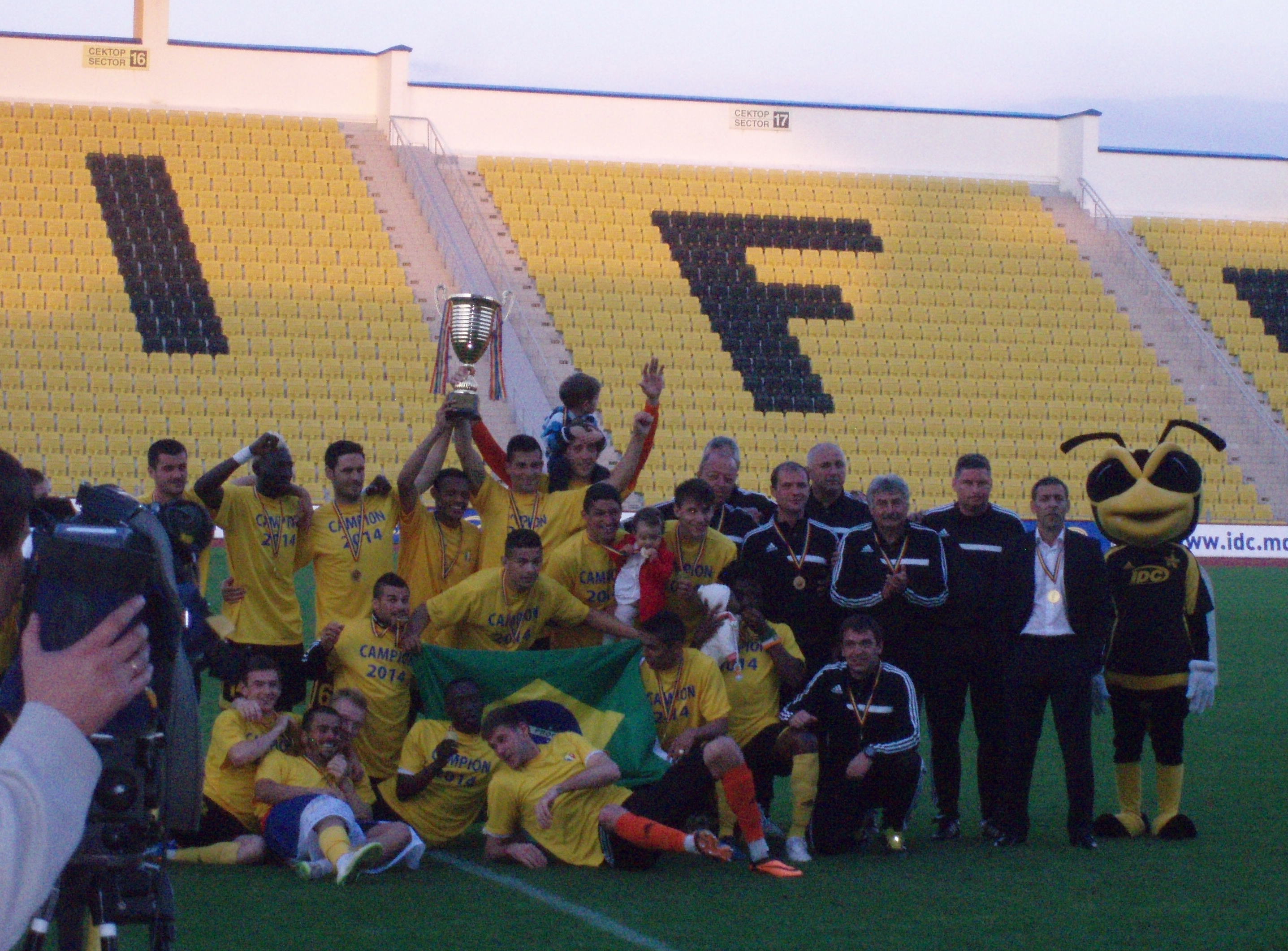 Шериф - чемпион Молдовы 2014